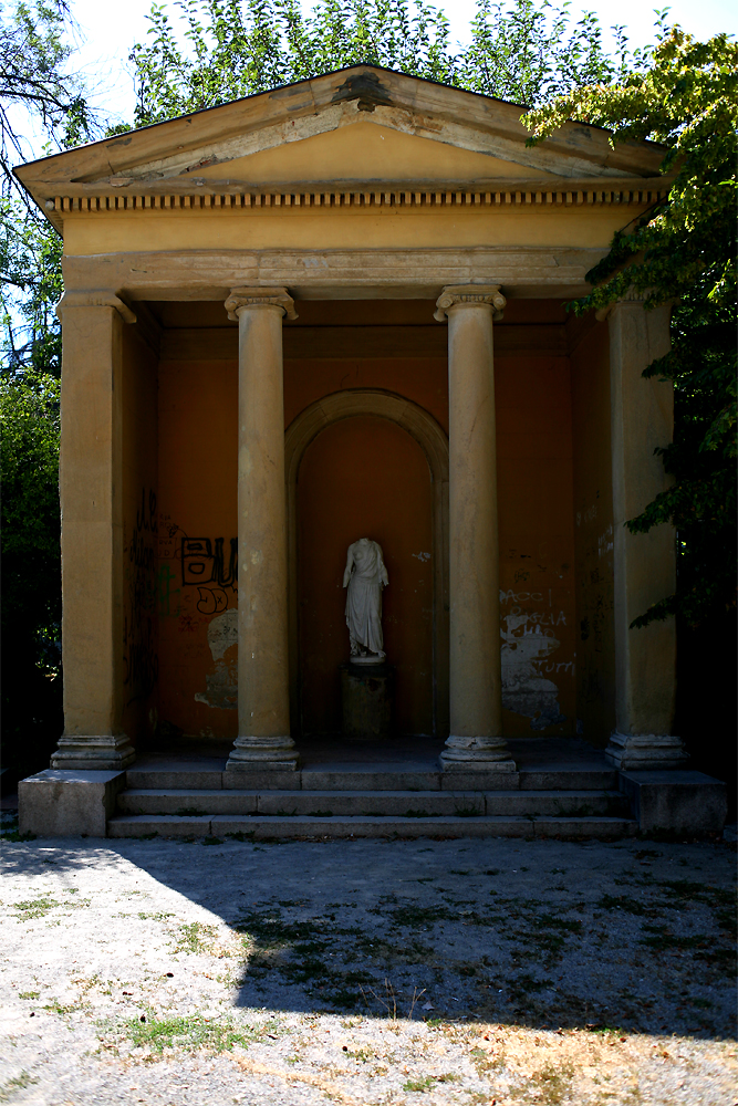 Il tempietto del Cagnola, in evidente stato di degrado e deturpato da vandali, all'interno dei Giardini della Guastalla, Milano